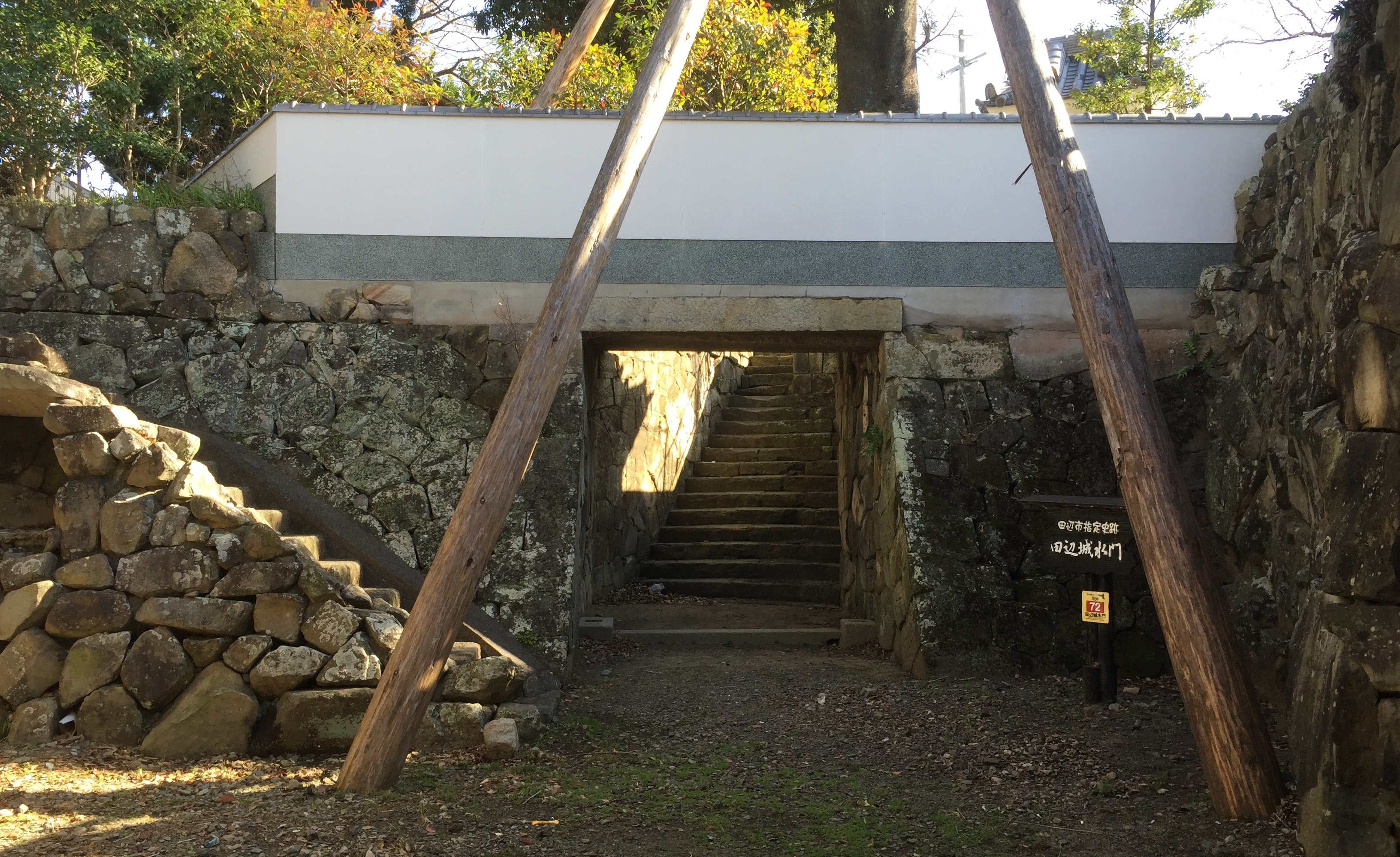 田辺城跡水門